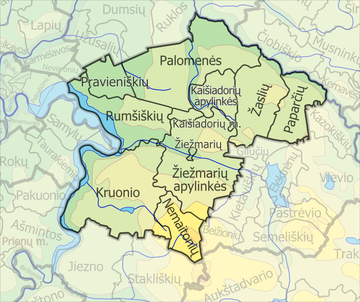 Padaryta iš lt::image:LietuvosSeniunijos.png